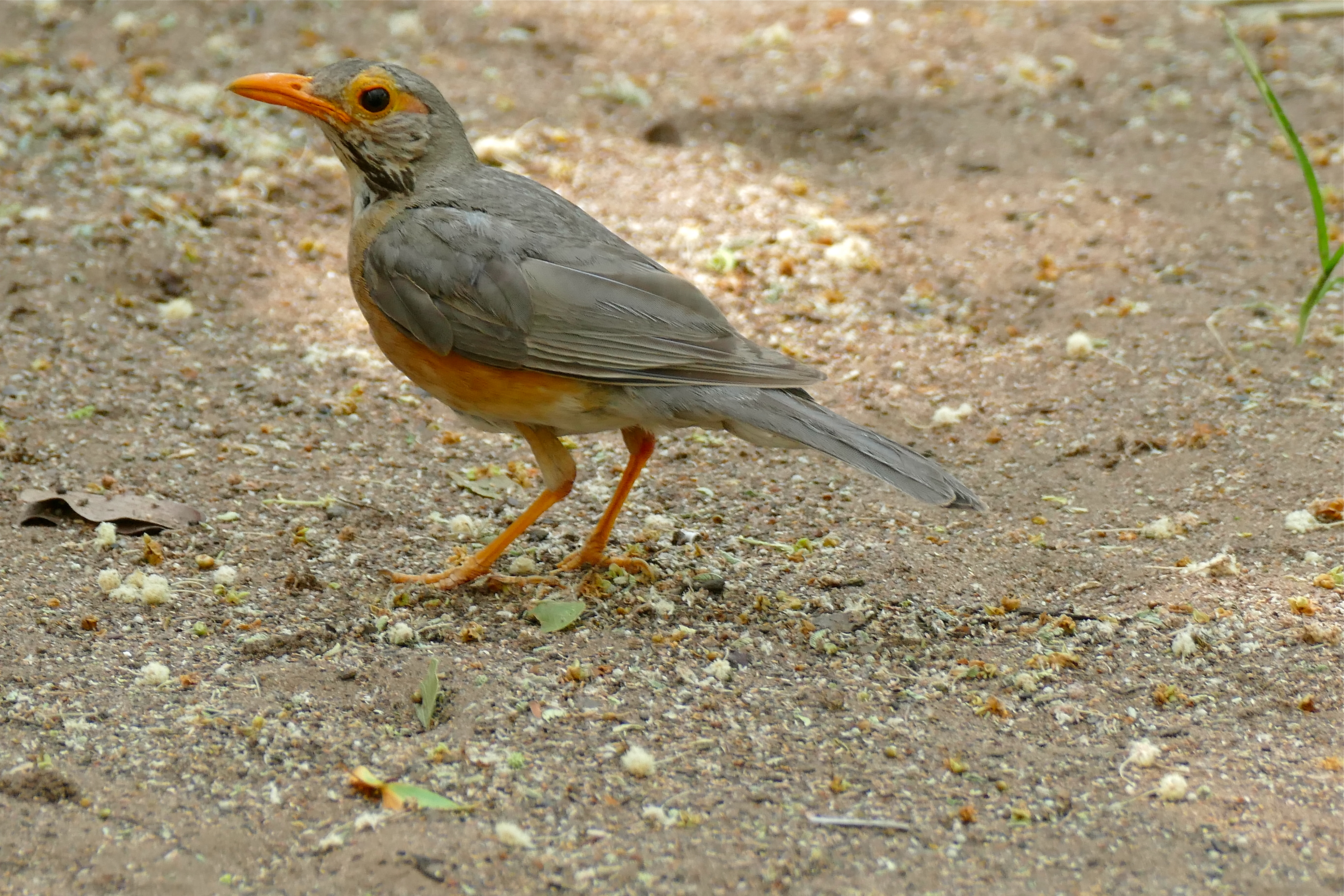 Letaba Camp, Kruger NP, SOUTH AFRICA